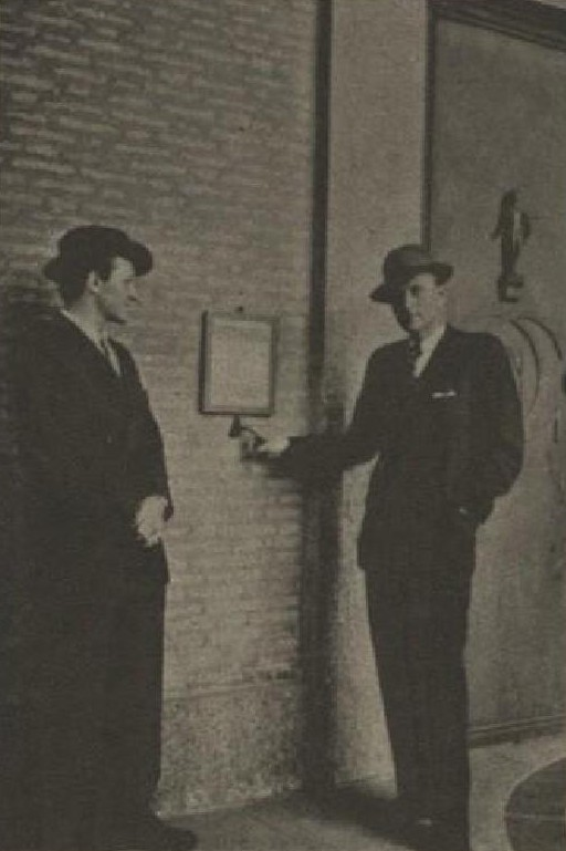 Jan Kodet (1910-1947) a Vincenc Vingler (1911-1981)